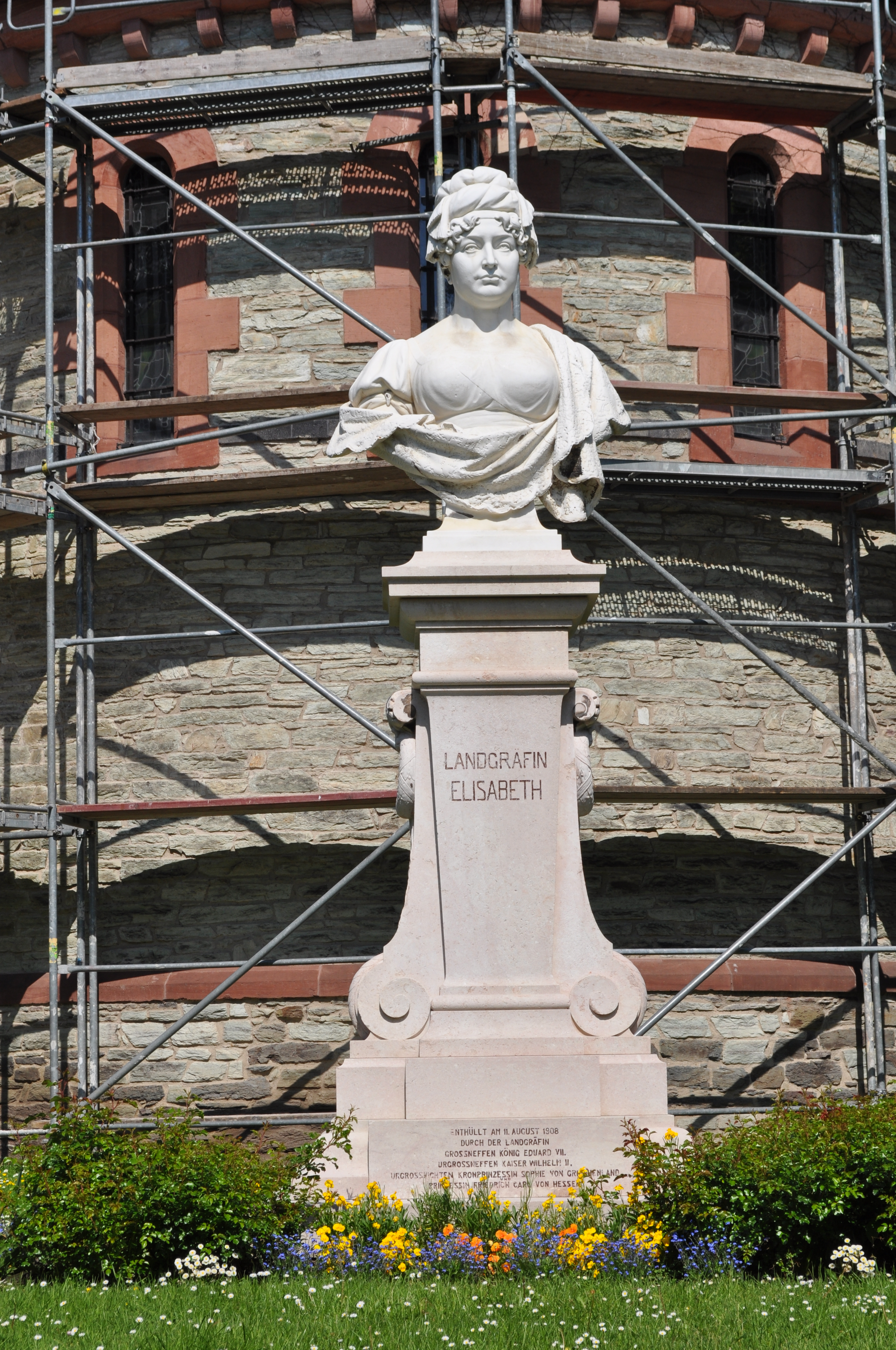 Bad Homburg, Denkmal Landgräfin Elisabeth